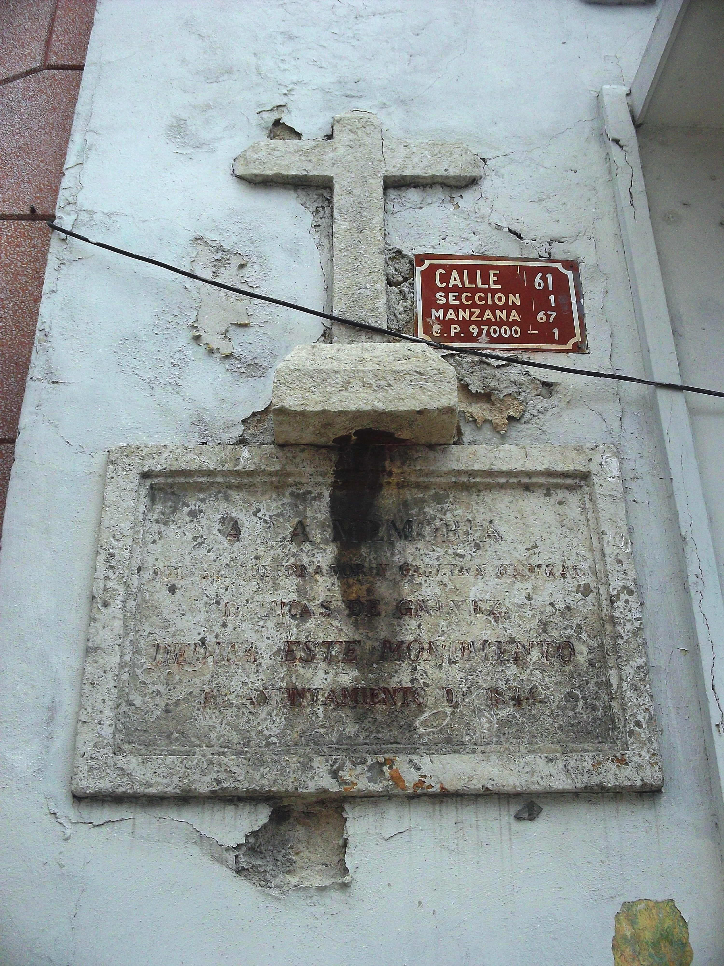 Lápida colocada por el ayuntamiento de Mérida en 1844 en el sitio donde fuera asesinado en 1792 Don Lucas de Gálvez, entonces gobernador de Yucatán. Por la antigüedad del monumento y por la libertad de panorama, está en dominio público y puede ser fotografiado libremente.